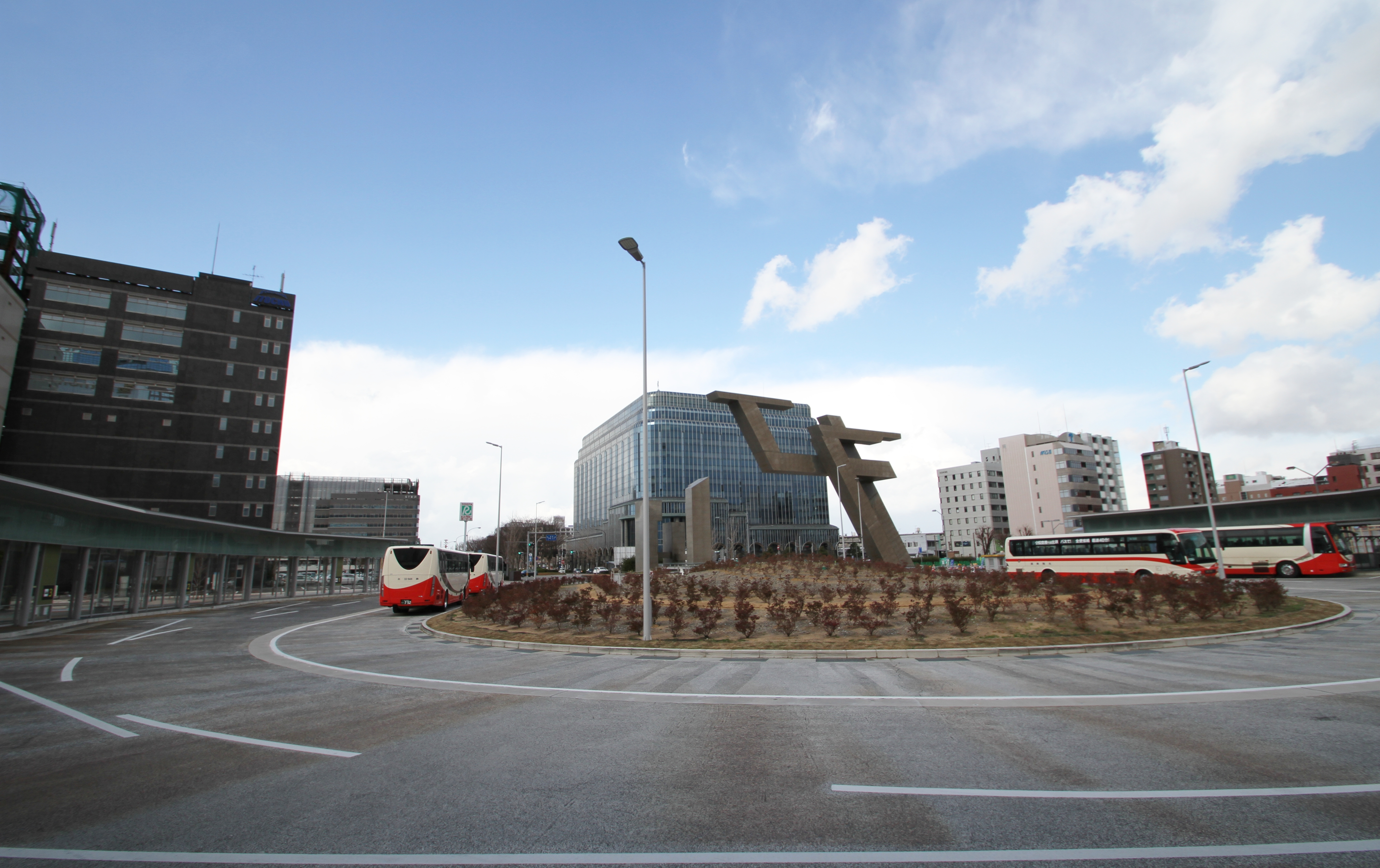 Kanazawa Station